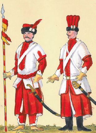 58. Ułan i Pocztowy 3 Pułku Ułanów (Poniatowskiego) (ułan i pocztwy 3 pułku PS buławy PL